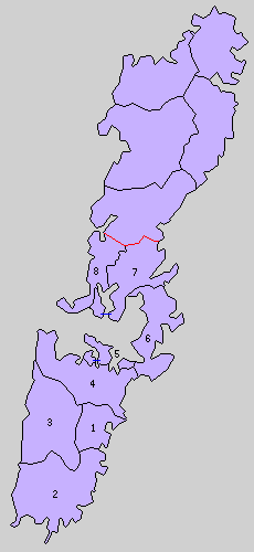 長崎県下県郡の島嶼町村制時点の町村。